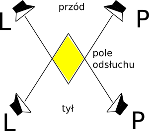 Idea działania kwadrofonii Żródło